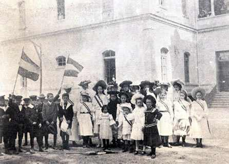 Fundado en México por inmigrantes alemanes para que sus hijos no perdieran la cultura y el idioma de su tierra natal, abrió sus puertas en 1894. Las instituciones educativas de ambos países reconocen el sistema de enseñanza desde principios del siglo 20.